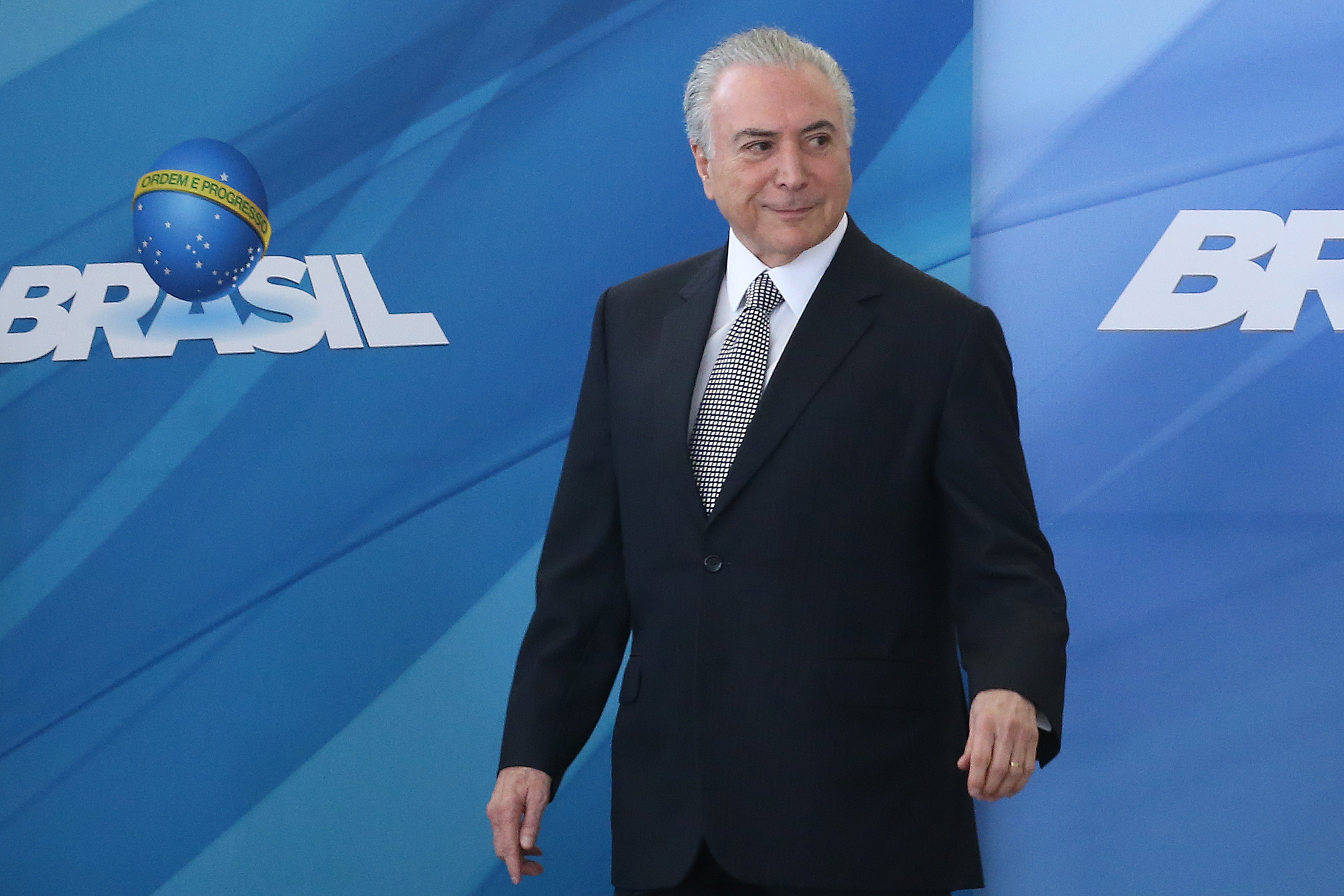 "O presidente Michel Temer na posse do novo ministro da Cultura, Sérgio Sá Leitão"